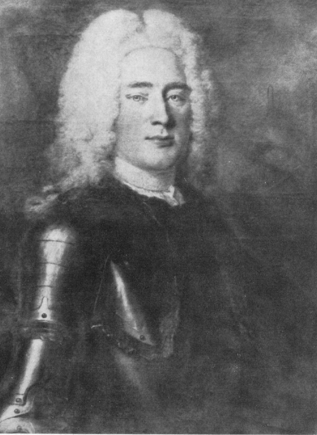 Helmuth Reichsgraf von Plessen Datum: um 1740 Quelle: Buch "Die Plessen", C.A. Starke Verlag, Limburg, 1971 Urheber: unbekannter Portraitmaler Hinweis: Scan des Portraits aus dem 18. Jahrhundert aus dem Buch die Plessen